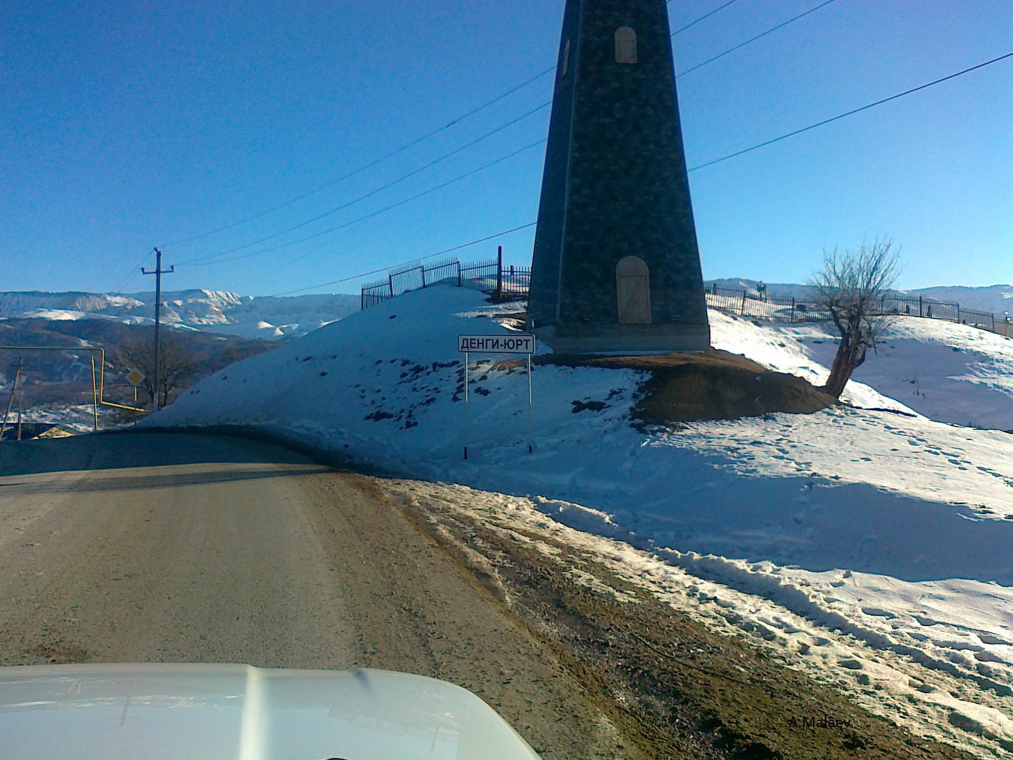 Нохчийн: Джалвади Малаев